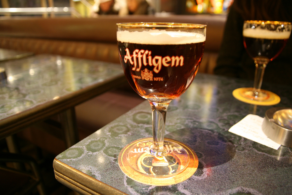 Affigem beer glass